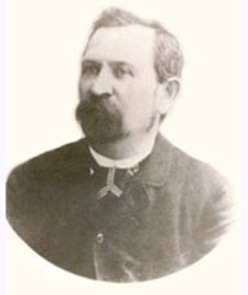 Géber Ede magyar orvos, bőrgyógyász, egyetemi tanár.